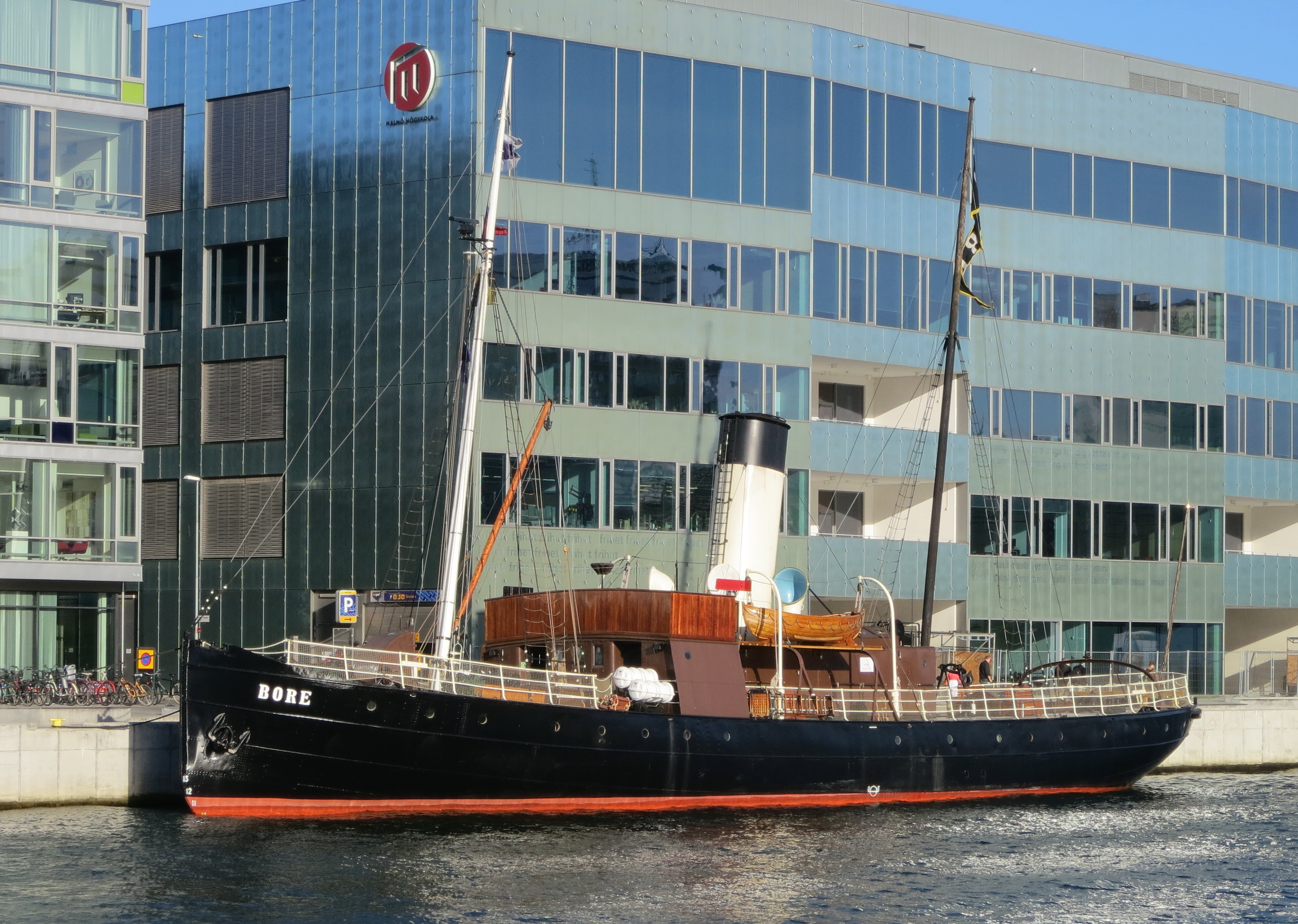 Isbrytaren Bore vid Hjälmarekajen i Malmö This is an image of the protected Swedish ship Bore, with call sign SELA .